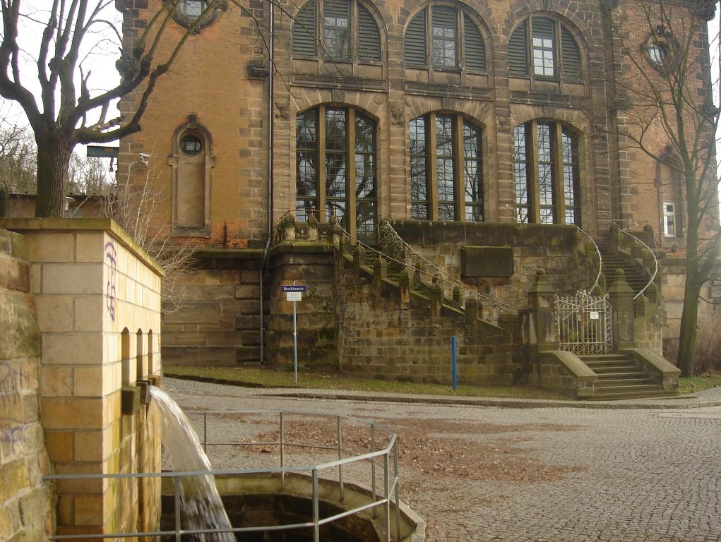 Ansicht des Wasserwerkes Saloppe in Dresden aus Richtung Westen, im Vordergrund der Ausfluss des Eisenbornbaches aus einer Gartenmauer und sein Eintritt in die bis zur Elbe reichende unterirdische Verrohrung